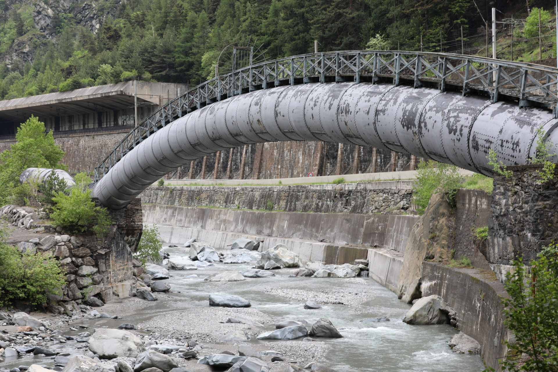 conduite forcée érigée par Paul Heroult la praz